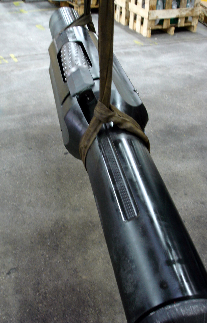 Roller Reamer